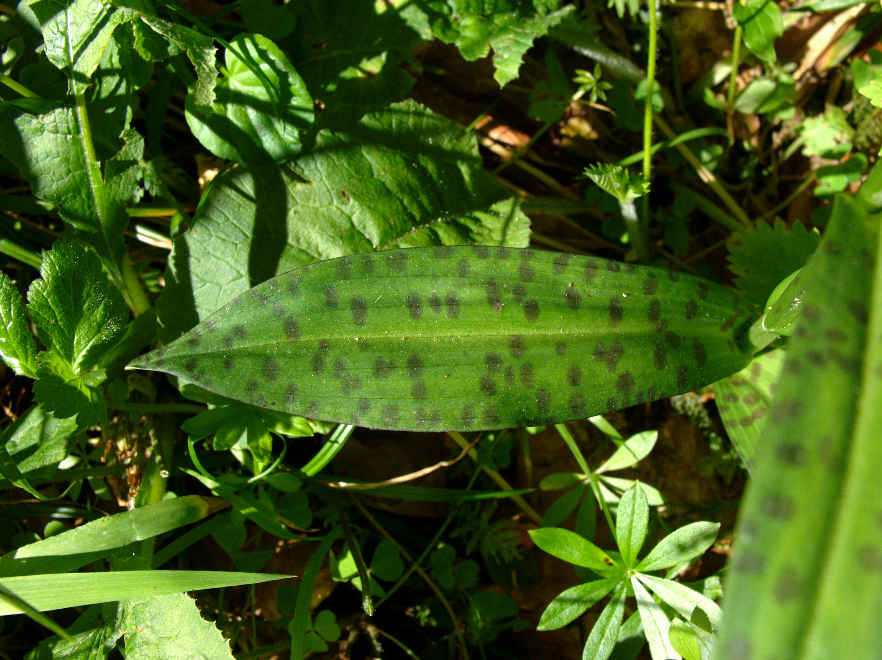 Dactylorhiza fuchsii (Orchidaceae). Combe de la Sombaille, Neuchâtel, Suisse.